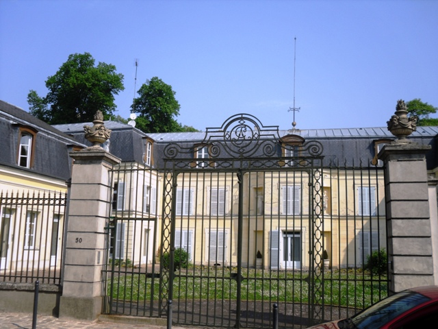 Le château d'Orangis à Ris-Orangis (91)